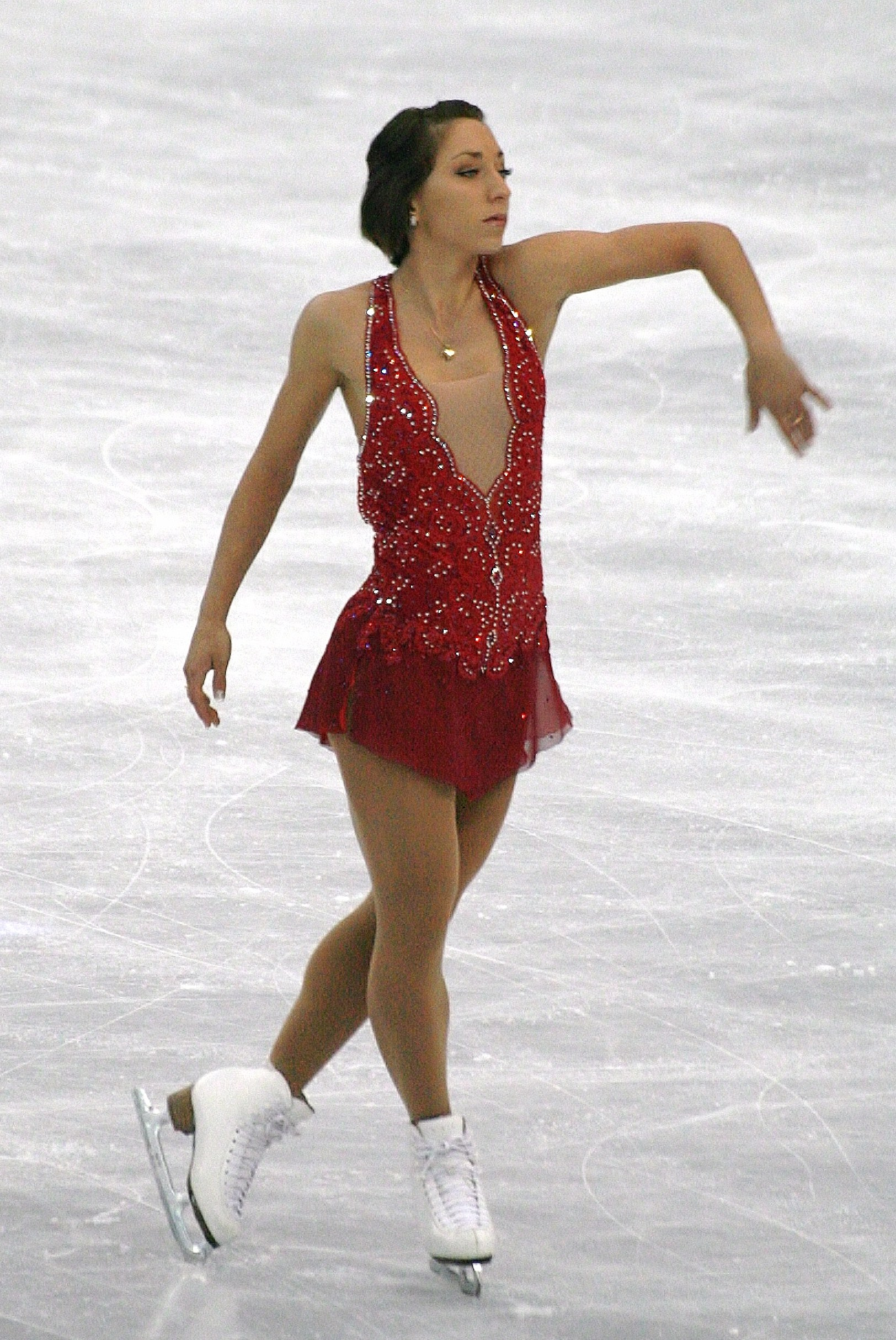 Амели Лакост (Канада) на чемпионате мира по фигурному катанию 2012 года.